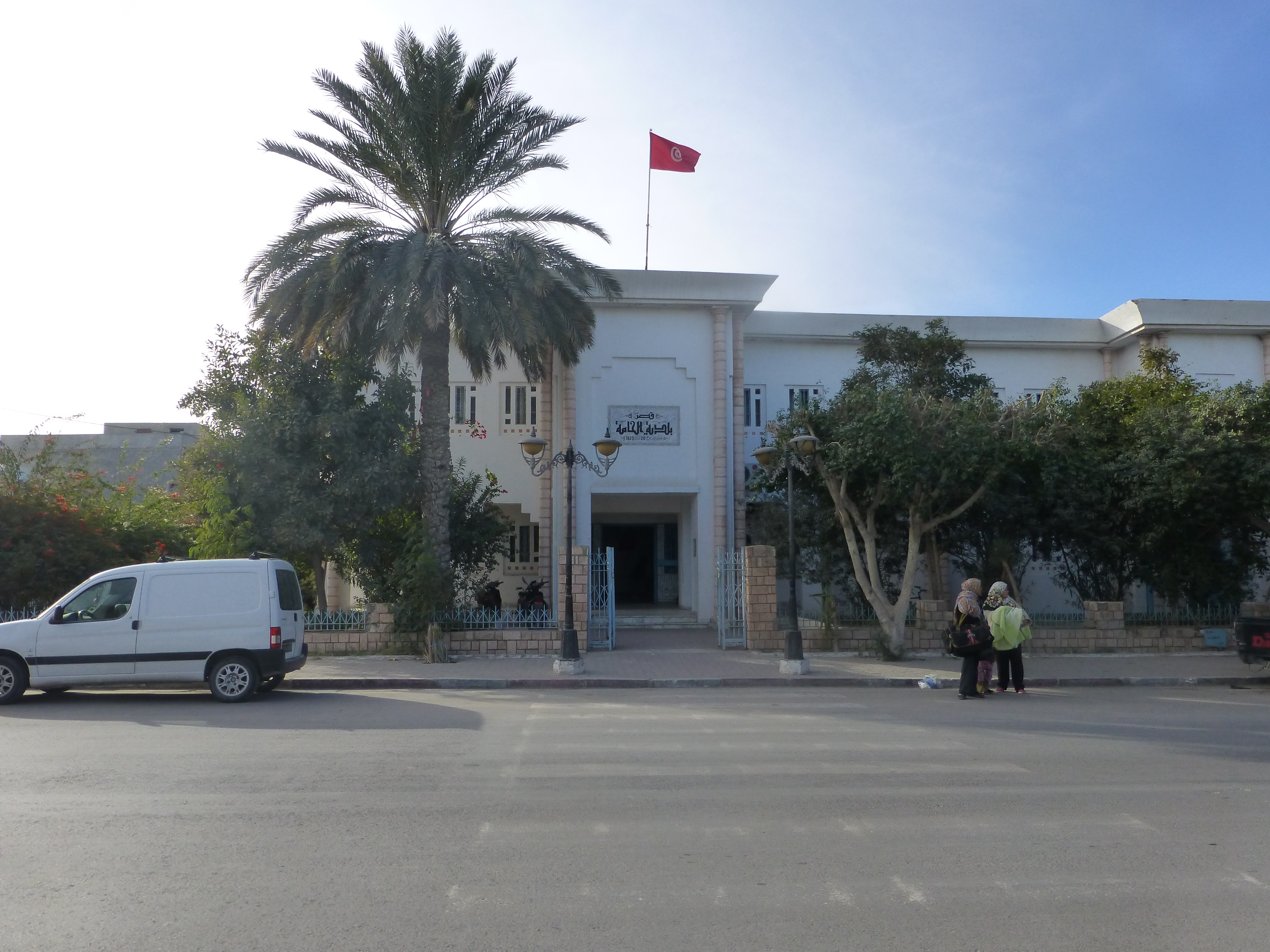 L'hotel de ville de la ville El Hamma (de Gabès) au sud tunisien